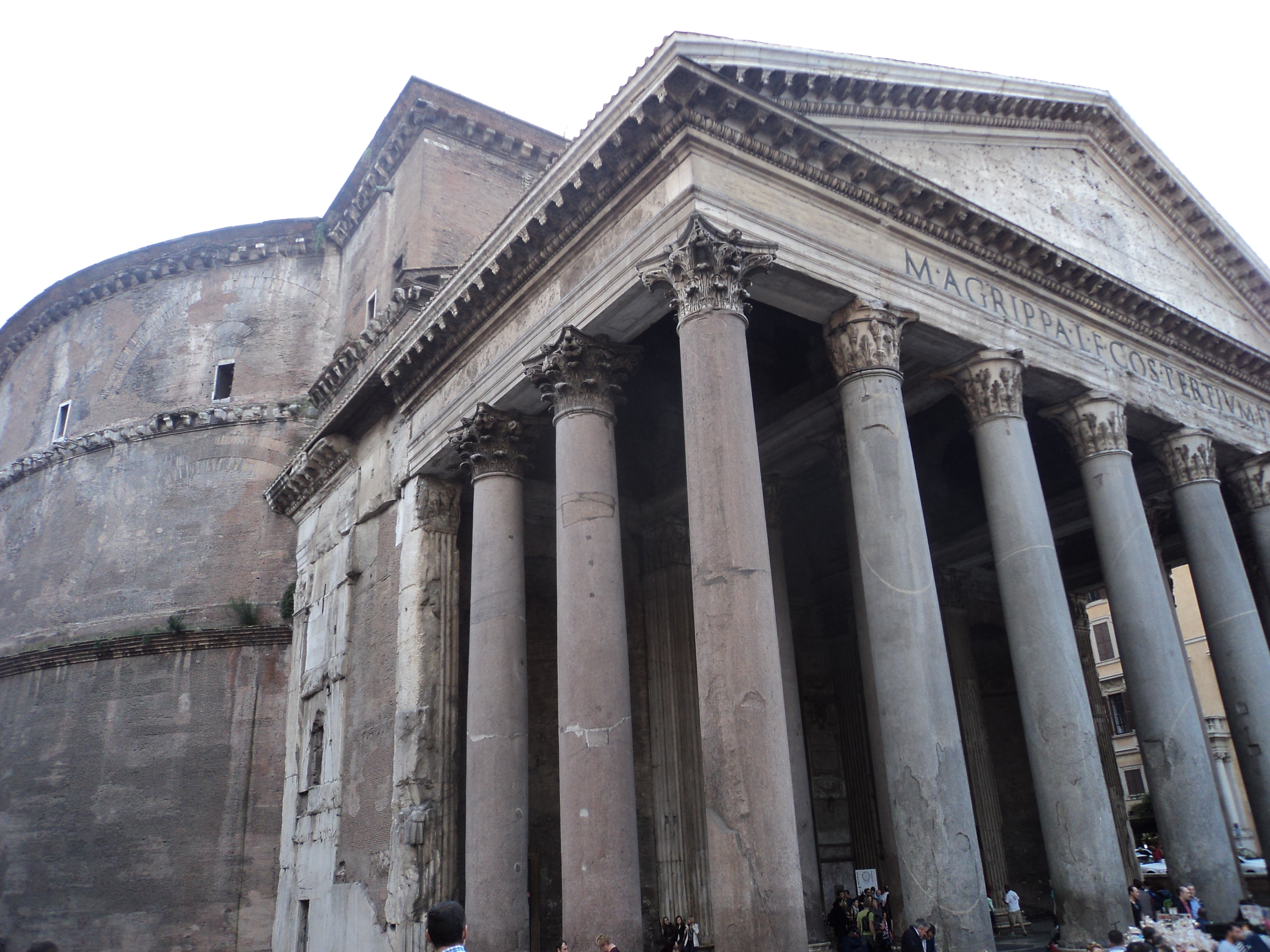 Pantheon (Roma)